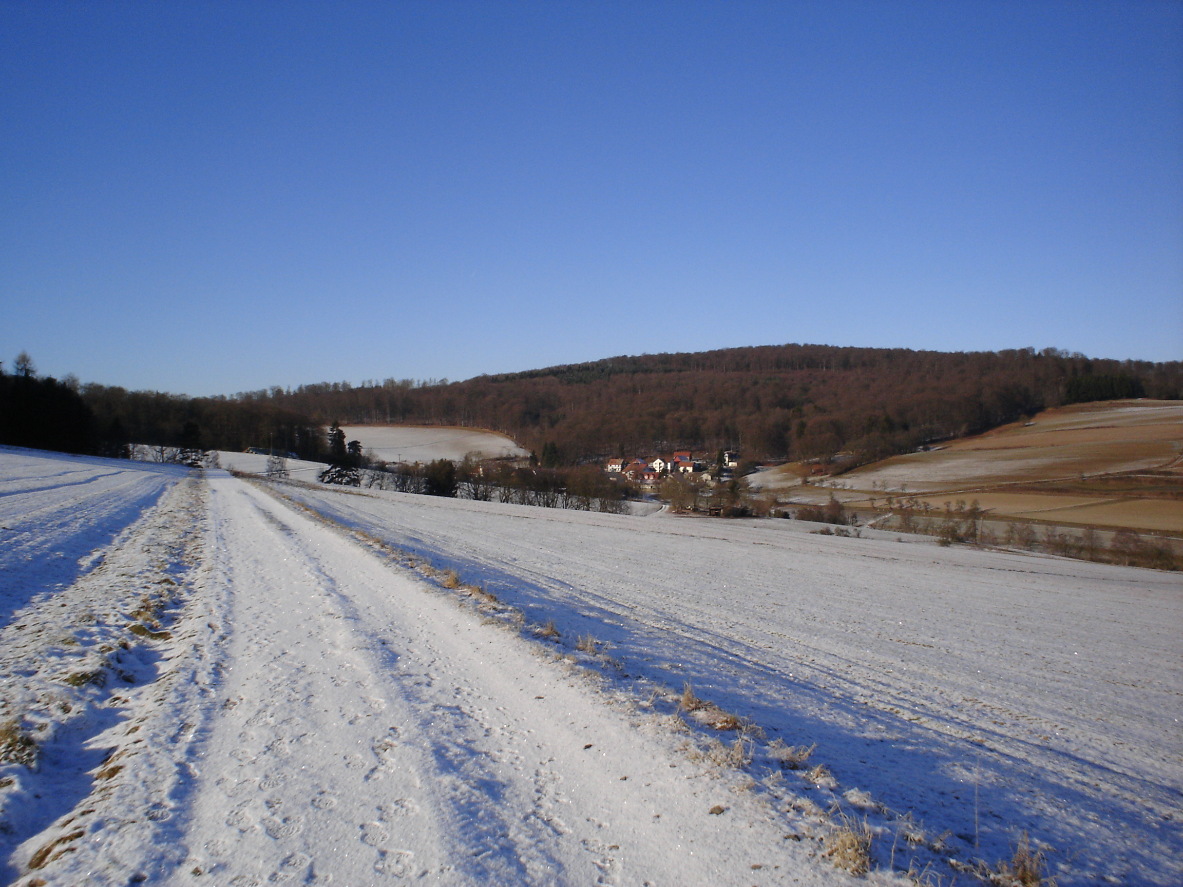 Hüttenrode (Hessen) im Winter